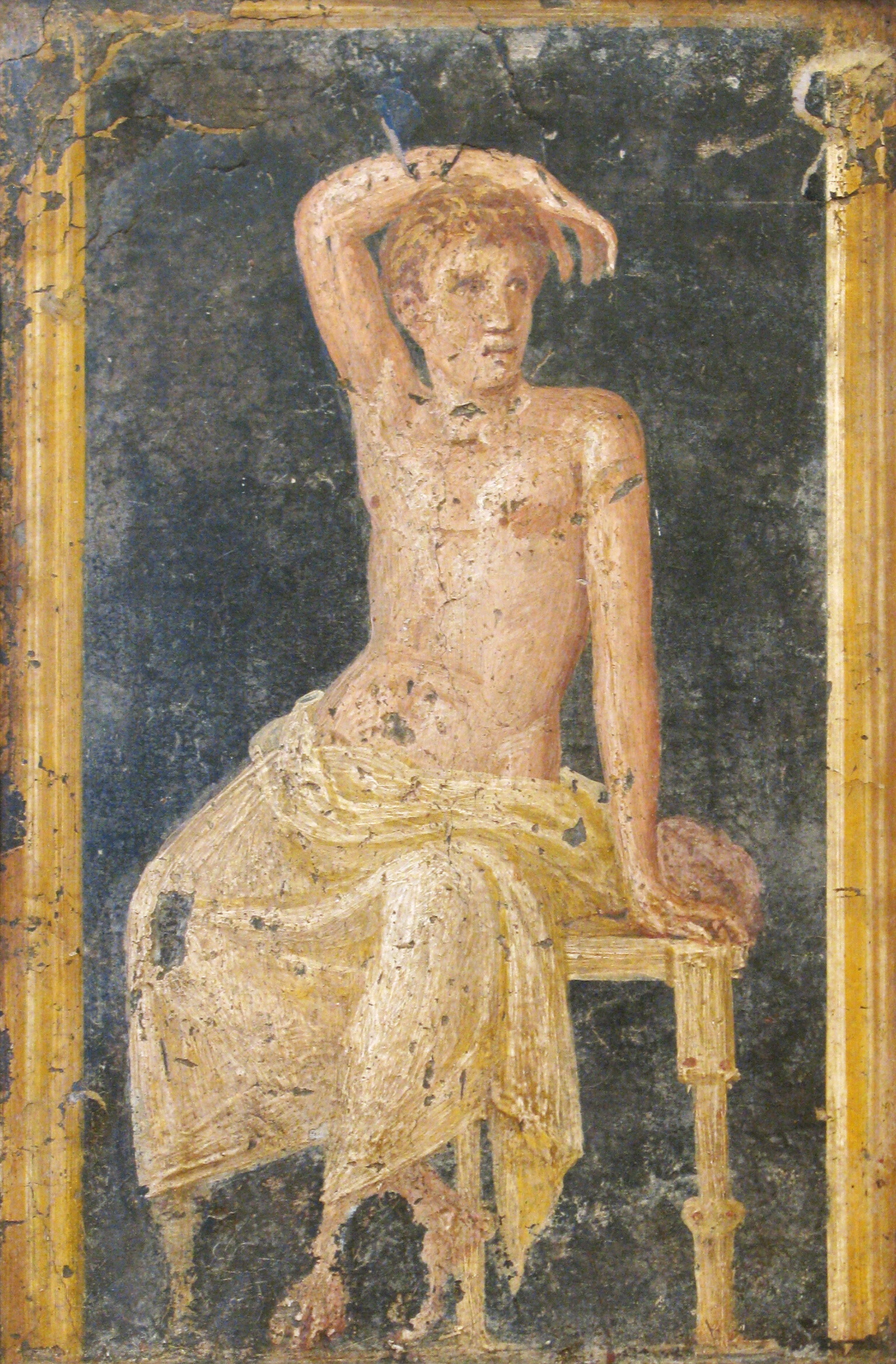 Giovane seduto, Museo archeologico nazionale di Napoli (inv. nr. 9093), da Stabiae, Villa di Arianna, triclinio 7.